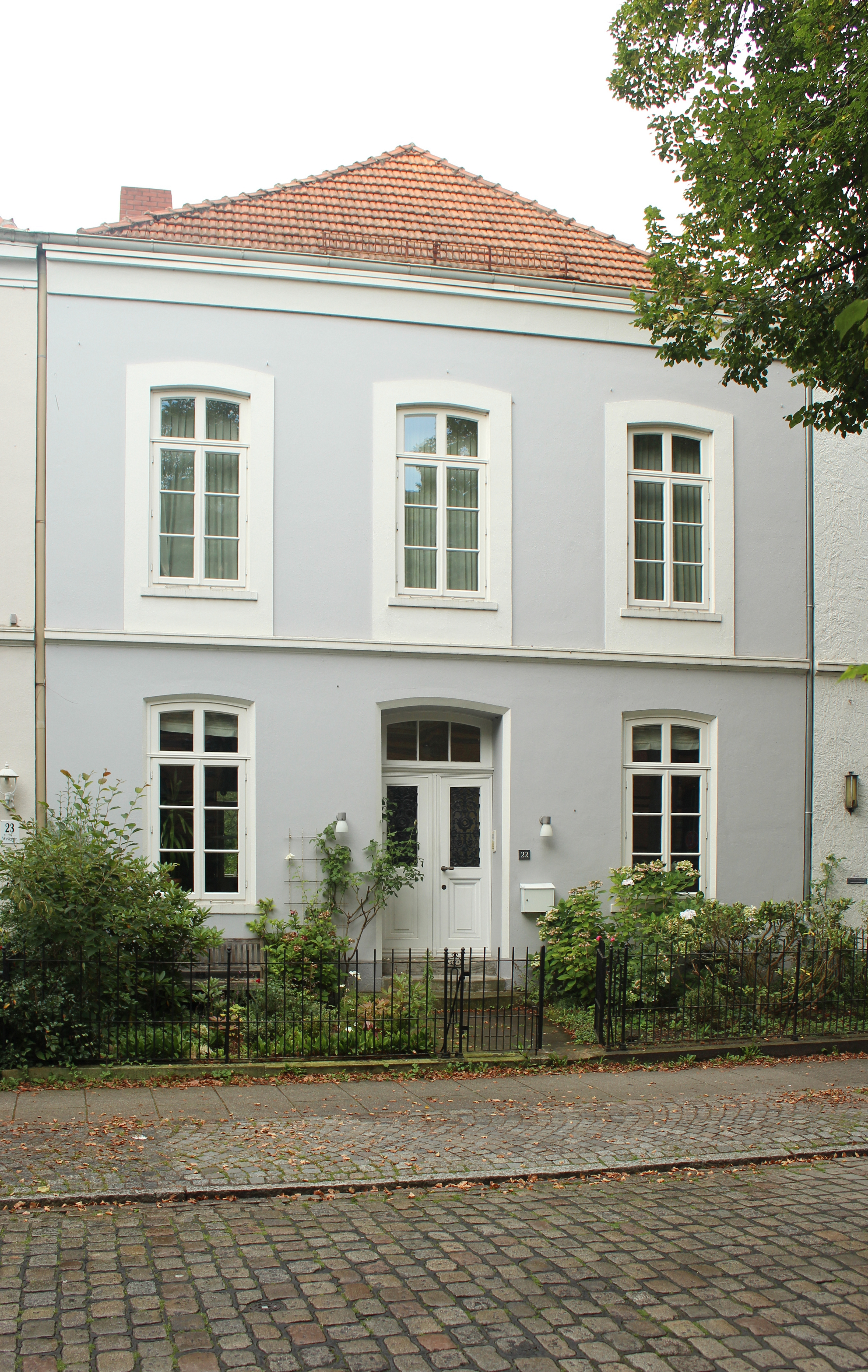 Haus Kapitän Lauer in Bremen, Weserstraße 22.Das abgebildete Objekt ist ein geschütztes Kulturdenkmal in der Freien Hansestadt Bremen, mit der Nr. 1319 beim Landesamt für Denkmalpflege registriert.